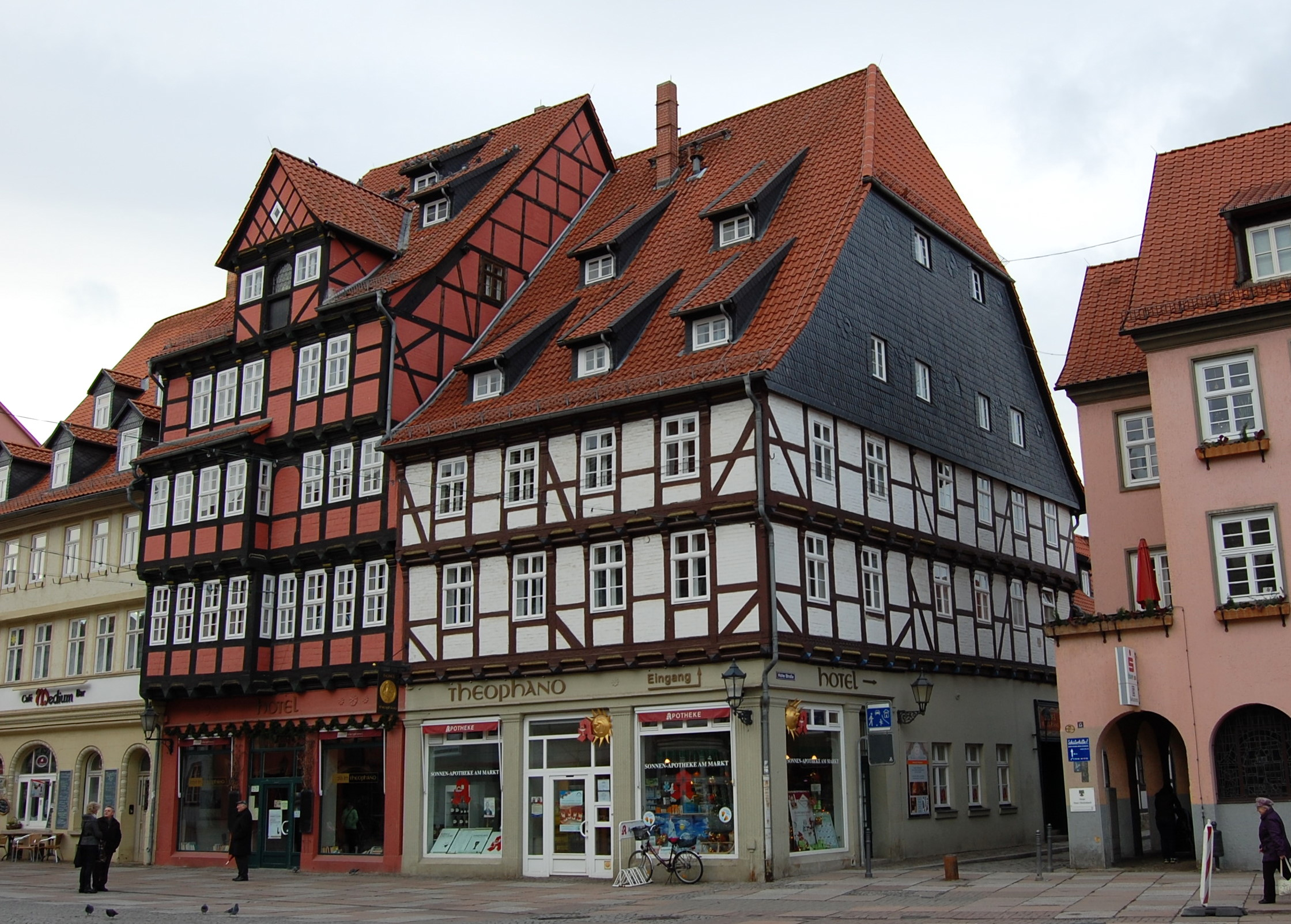 Quedlinburg Hotel Theopano